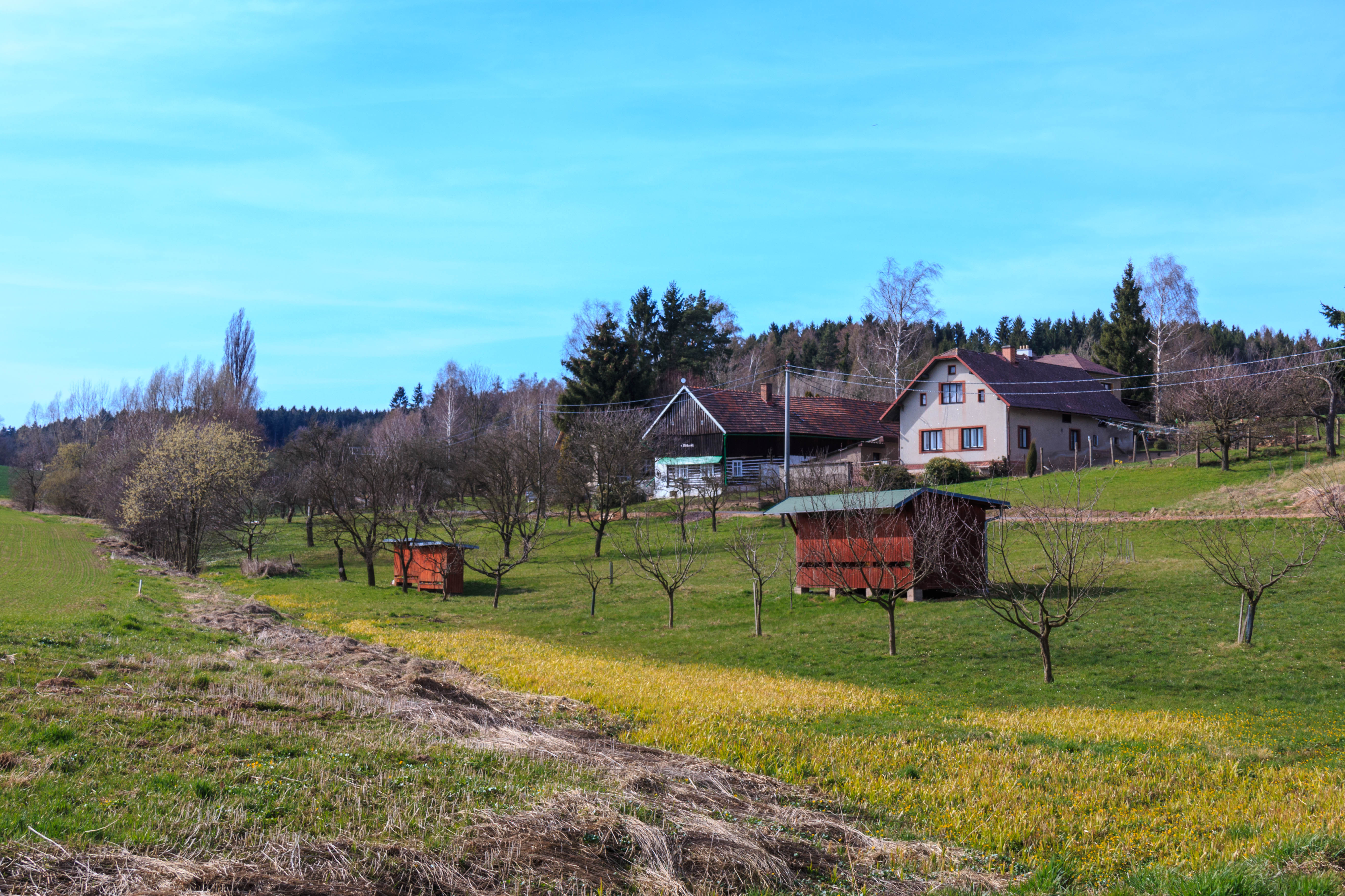 Končiny čp. 140